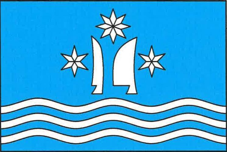 Charváty vlajka